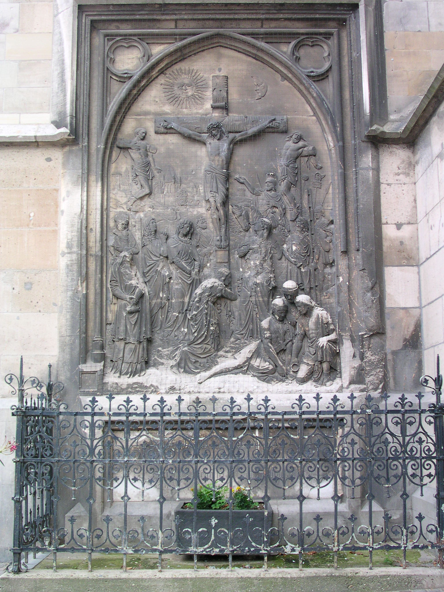 Aachen, Großkölnstraße: von Lambert Piedboeuf geschaffene Kreuzigungsdarstellung an der Nikolauskirche